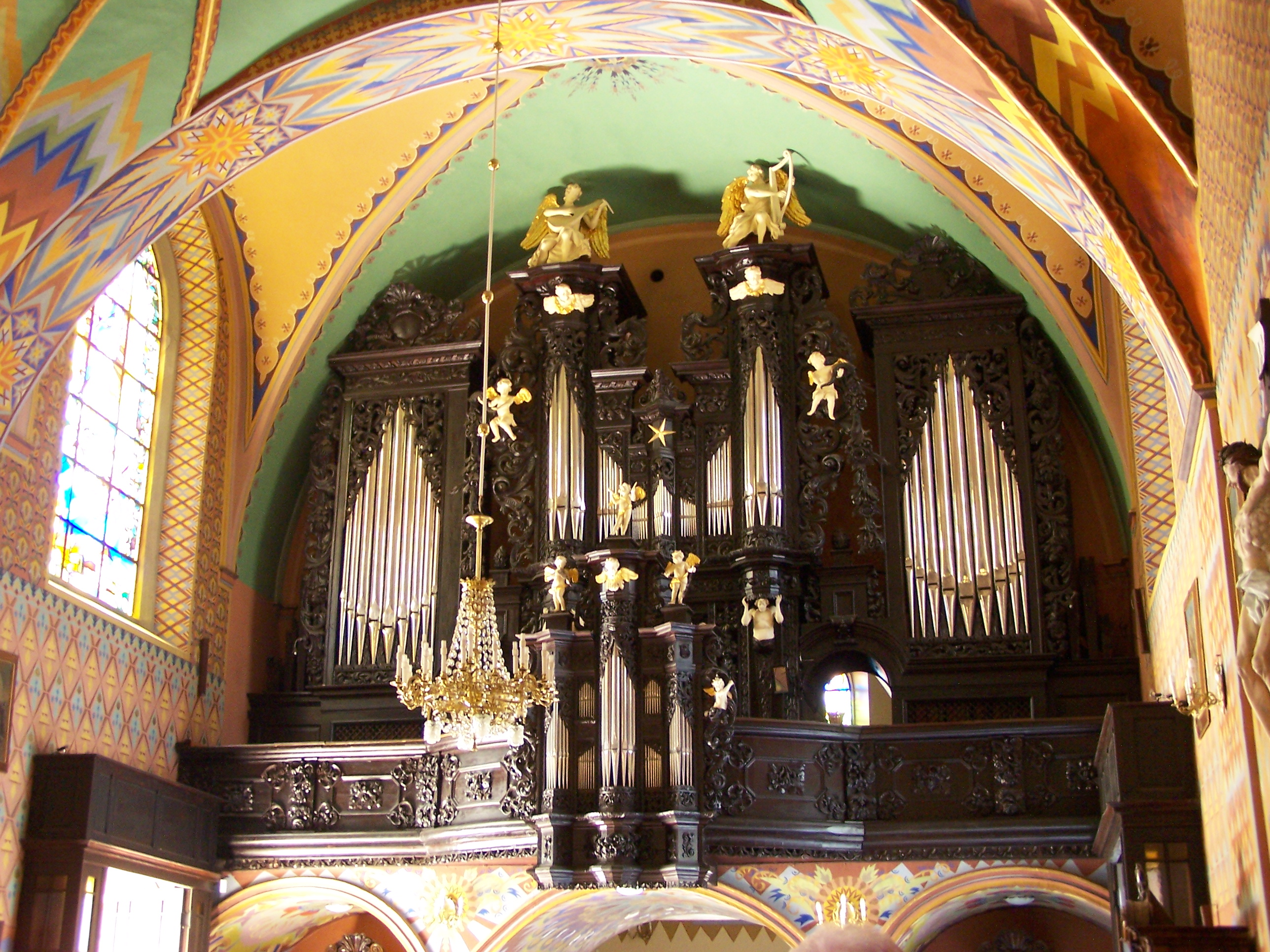 Organy w konkatedrze w Żywcu.